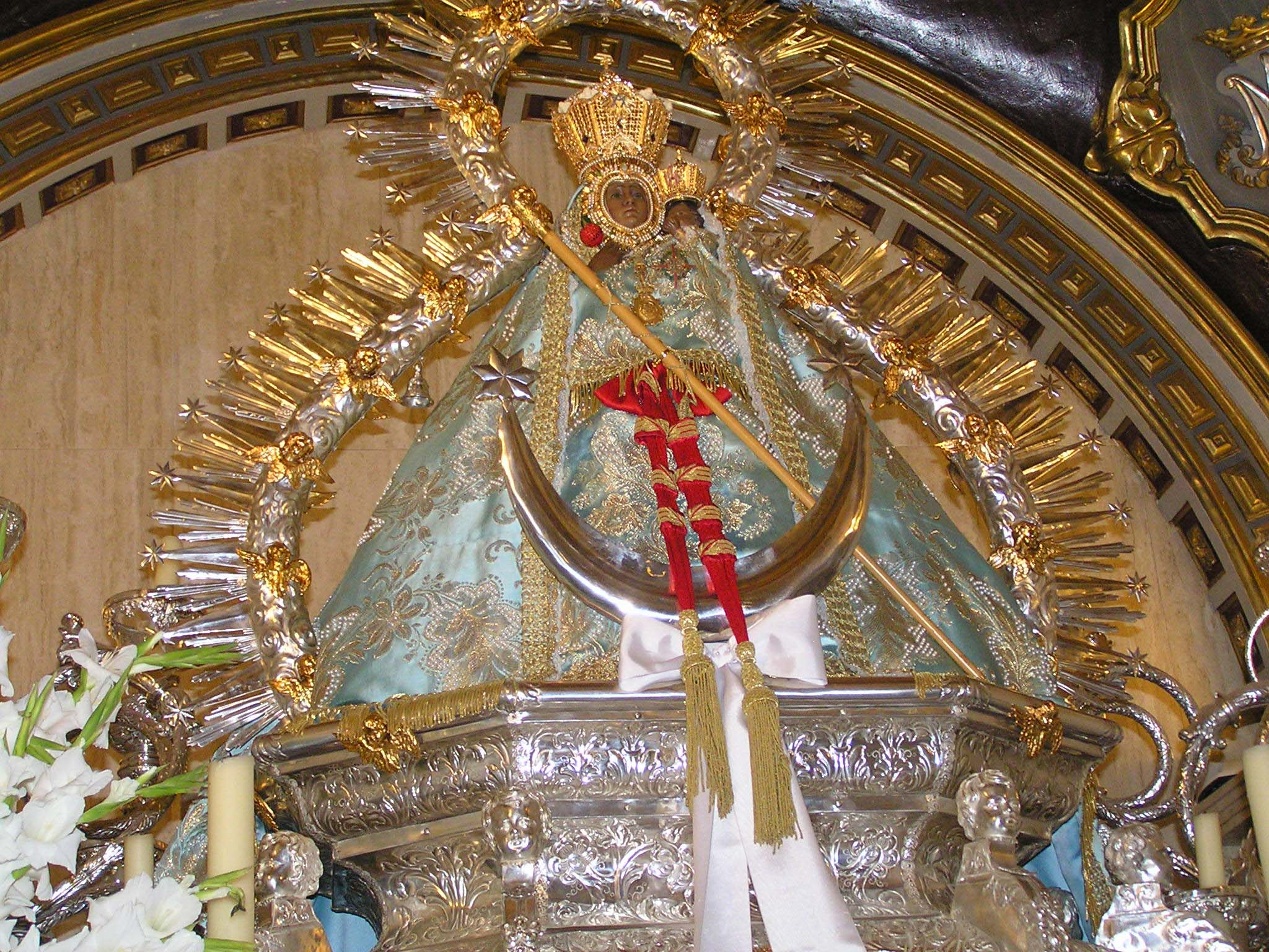 Imagen de la Virgen.